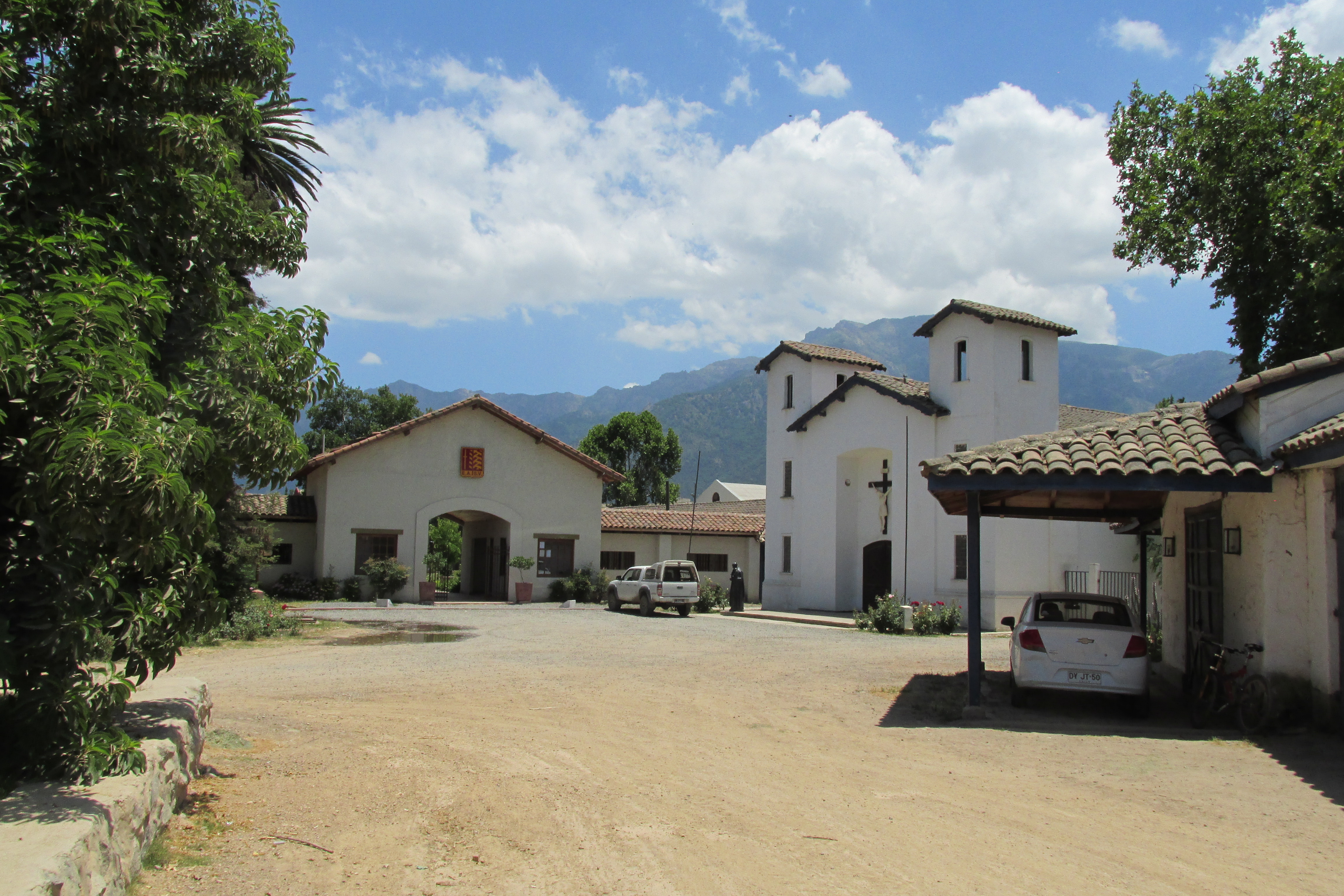 Capilla de la Escuela Agrícola San Vicente de Paul, en Fundo Quimávida comuna de Coltauco